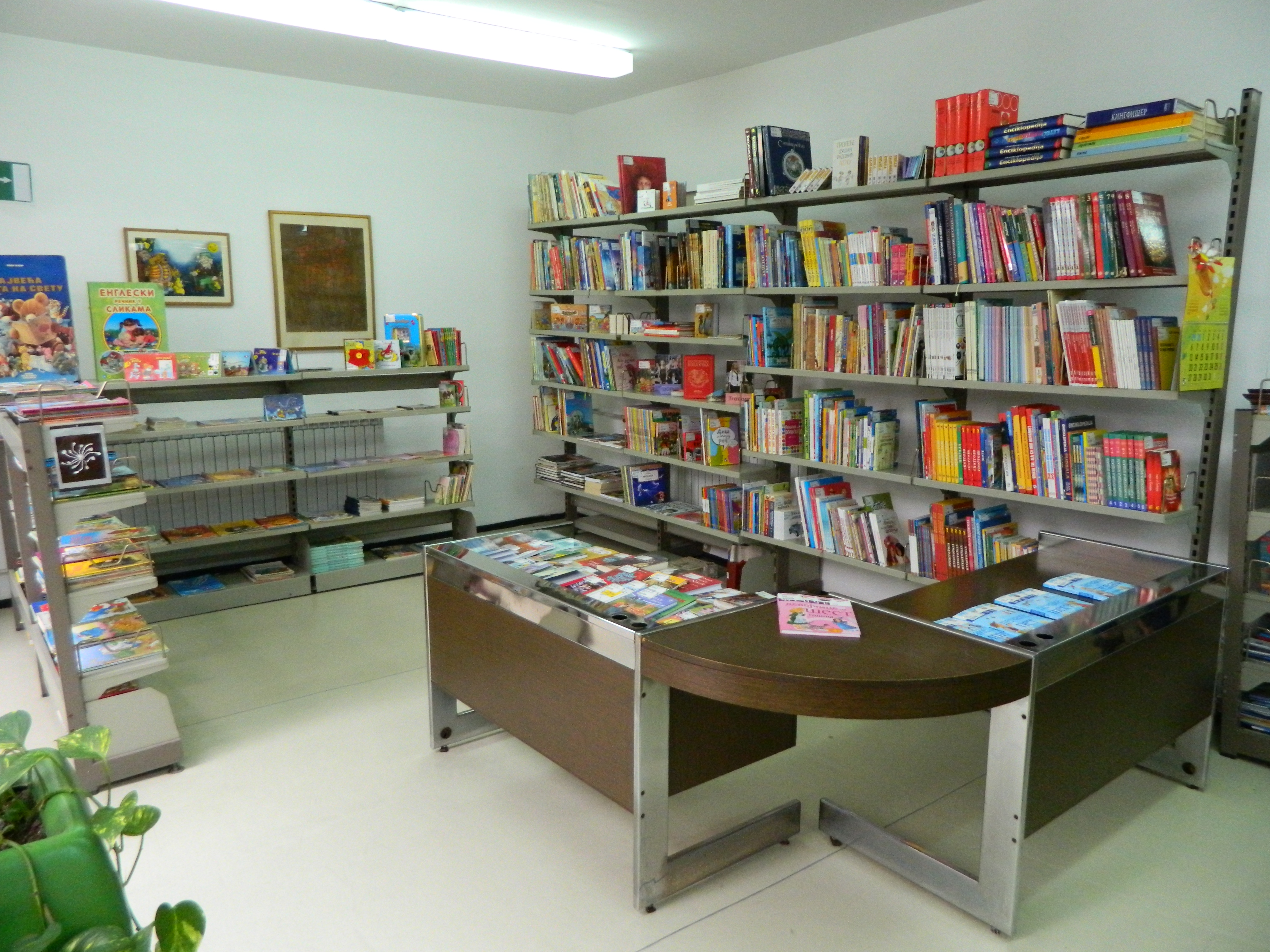 Dečije odeljenje u bibliotekci "Radoje Domanović", Surdulica